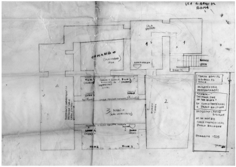 pianta teatro beat'72, via g. belli 72-roma. spettacolo 'Stanze-the other side of the wind'- 1979-originale di paolo bologna